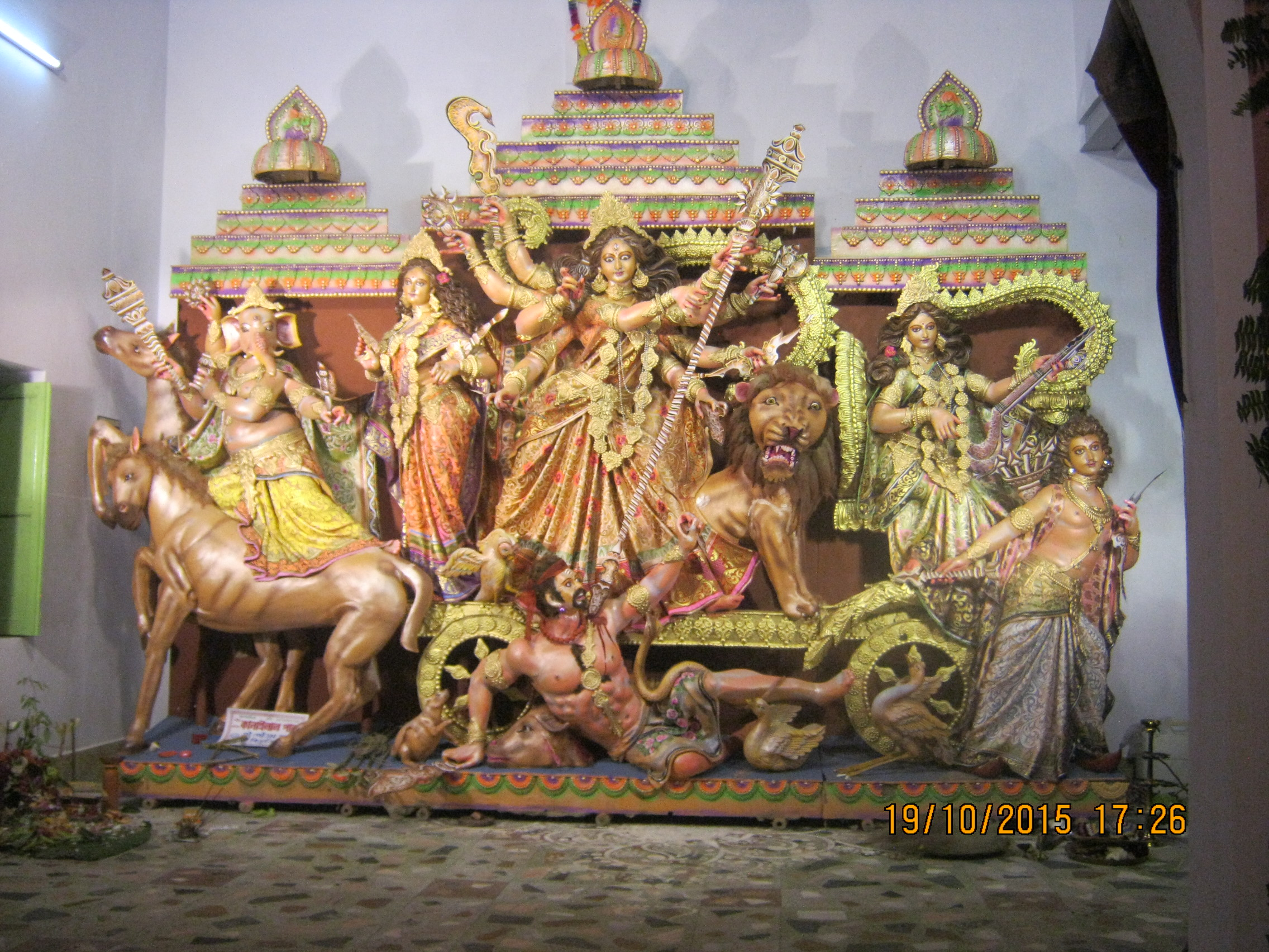 Chatra Sitalatala Natya Samiti, Serampore